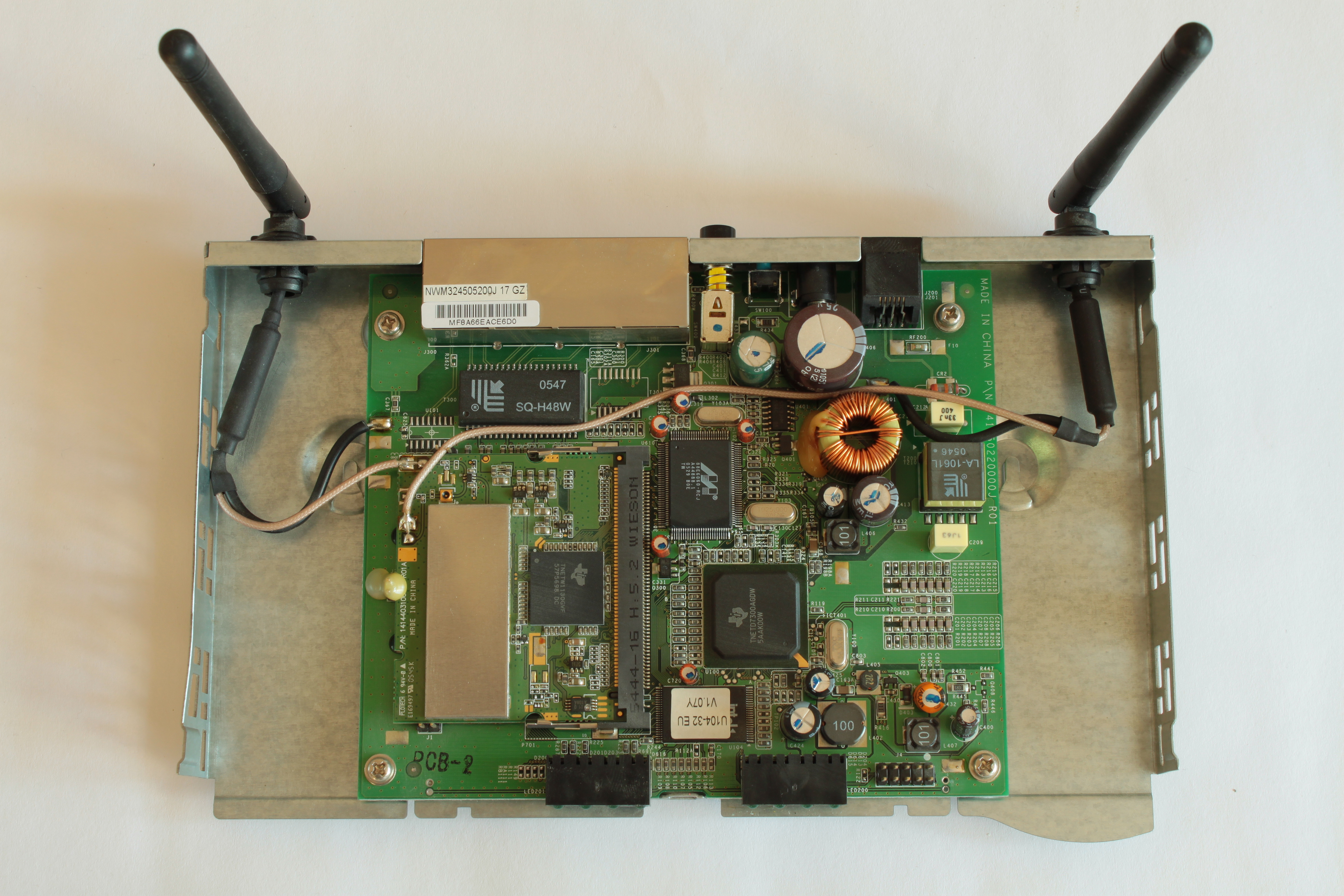 3Com OfficeConnect ADSL Wireless 11g Firewall Router (3CRWDR100Y-72)